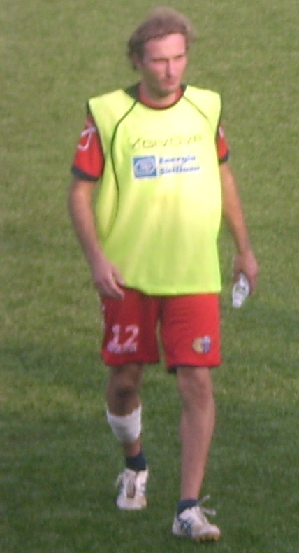 Giovanni Marchese al centro sportivo Torre del Grifo Village a Mascalucia (CT)